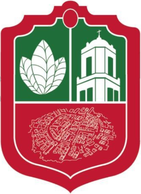 Santiago Ixcuintla címere